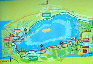 planol estany